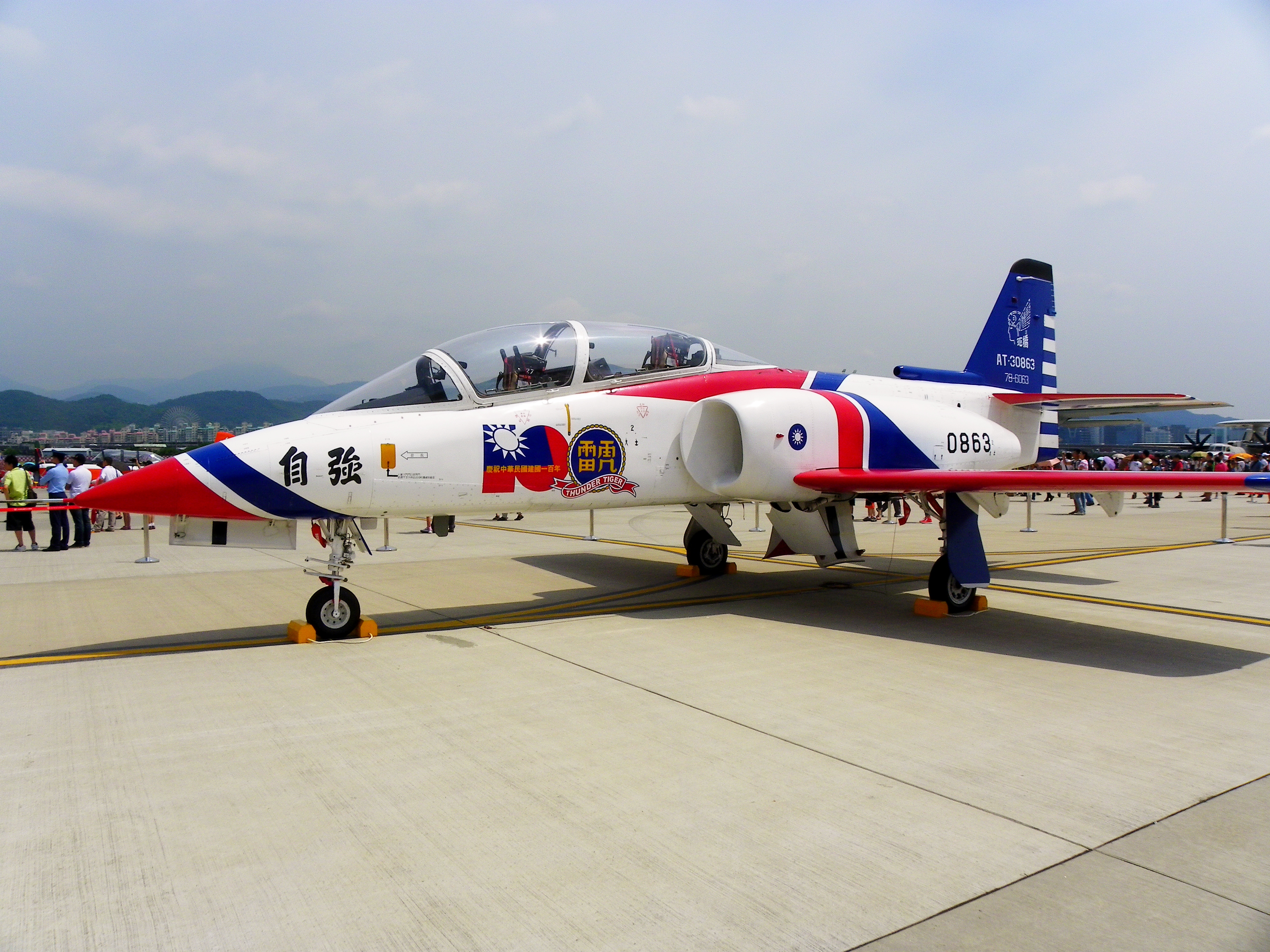 中文（台灣）: 使用民國一百年紀念紋章的中華民國空軍雷虎特技小組AT-3自強號教練機，攝於2011年8月13日空軍松山基地營區開放活動。